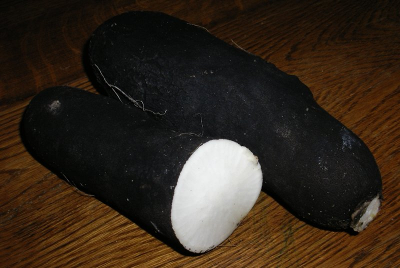 Radis noir, un radis entier et un autre coupé, photo faite par LimesleWalon: deus Ramonasses, ene côpêye a deus